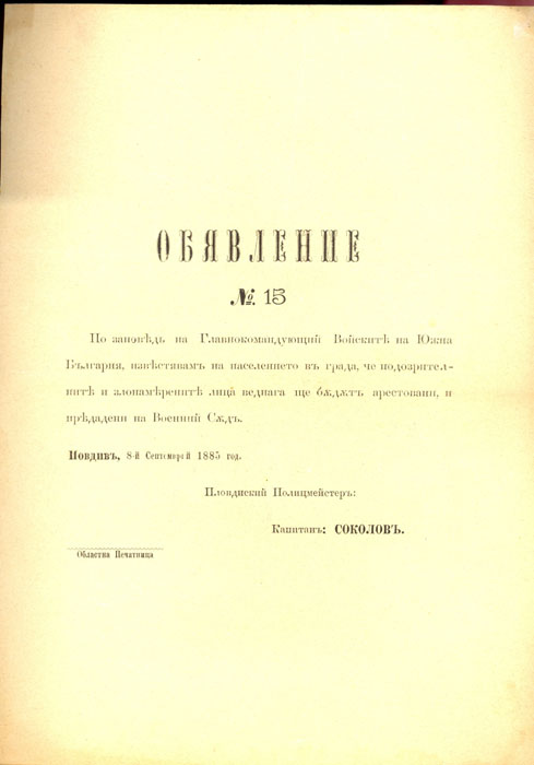 Заповед на Иван Соколов от 8 септември 1885.